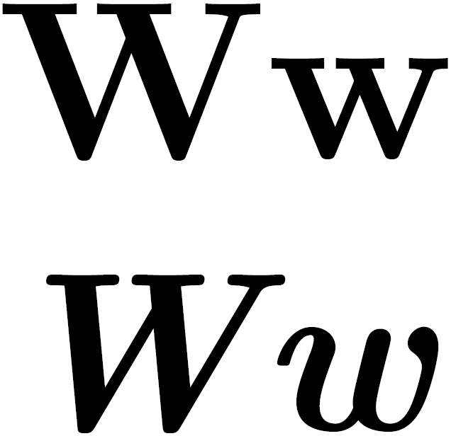 Latin letter W